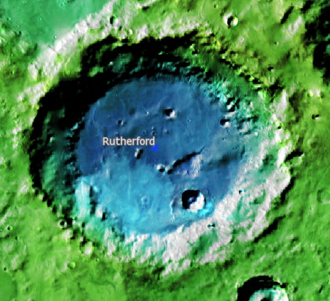 Cráter marciano Rutherford. (Imagen IAU/USGS/Goddard/A SU/USGS)